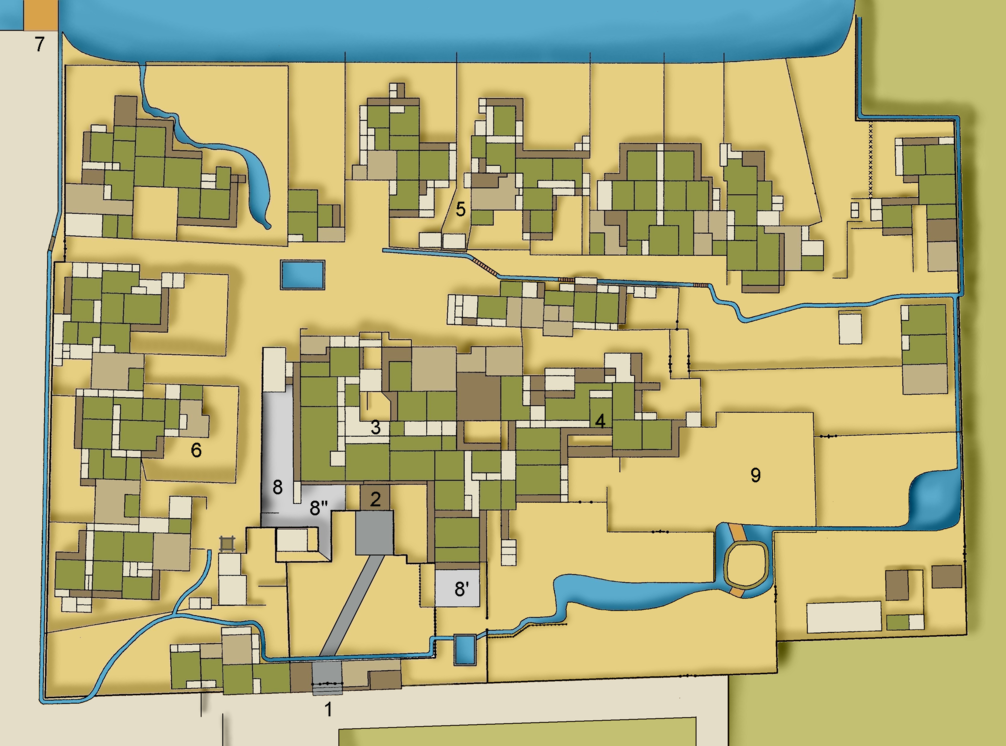 豊後国日田郡（現在の大分県日田市）にあった日田陣屋の平面図。山田家が所蔵する「御陣屋平面図」を元に作成した。徳川幕府が直轄地を治めるにあたって日本の江戸初期に永山城を廃止し陣屋を設置した。江戸時代中期には幕府直轄地を治める九州の拠点として、四郡代の内の「西国郡代」の役所建物として使用された。この図は1817年から1835年の間の様子を描いたものである。